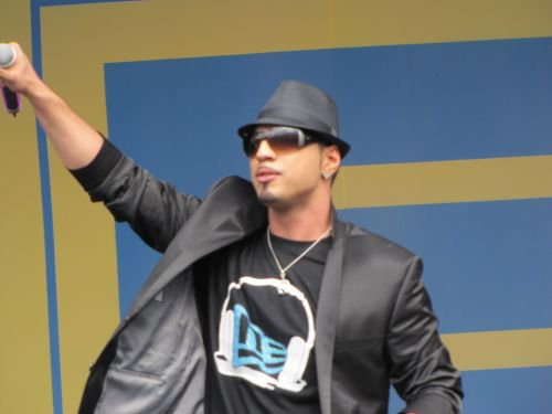 Beschreibung:Mehrzad Marashi bei Edeka Quelle:Bild selbst erstellt Datum:12.Juni 2010 Autor:Sanin Huskic